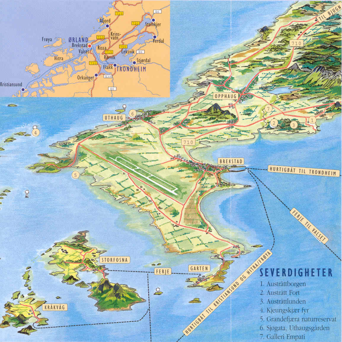 Perspektivkart over Ørland kommune i Sør-Trøndelag. Lagt ut av kommunens informasjonssjef.